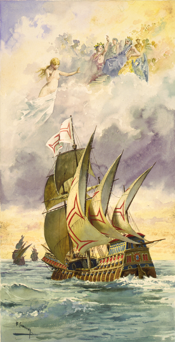 Vasco da Gama, navegador e explorador português.